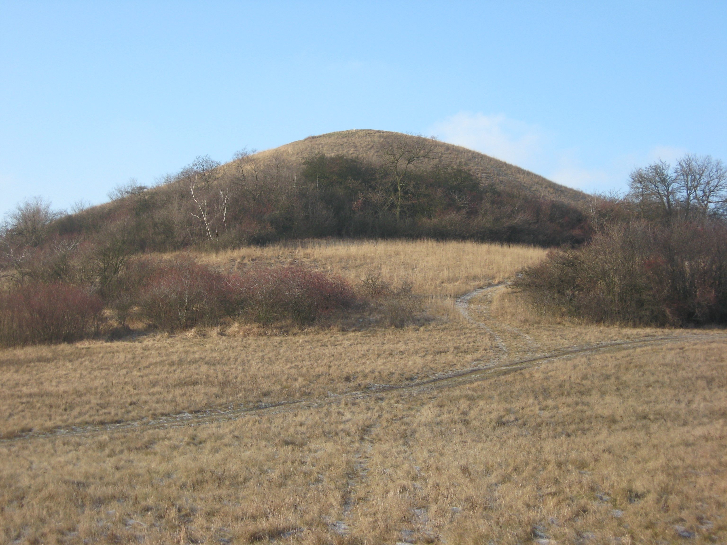 Česky: Sutom, okres Litoměřice, Holý vrch